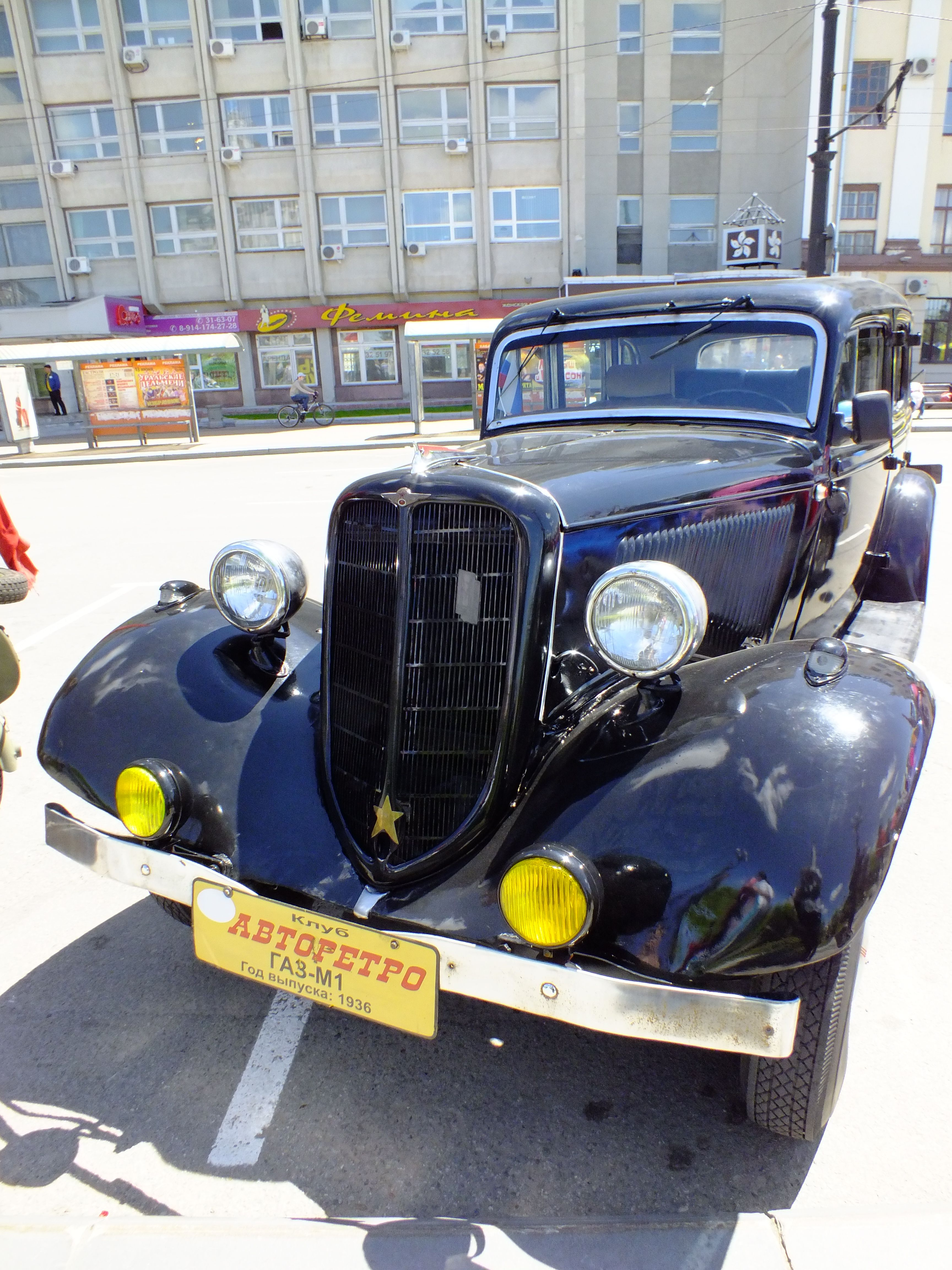 GAZ-M1